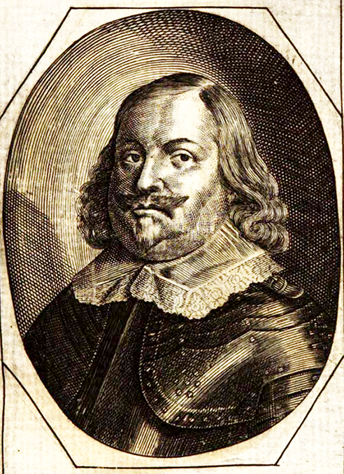 Kupferstich des Feldmarschalls Johannes Ernst von Reuschenberg (1603 - 1660)